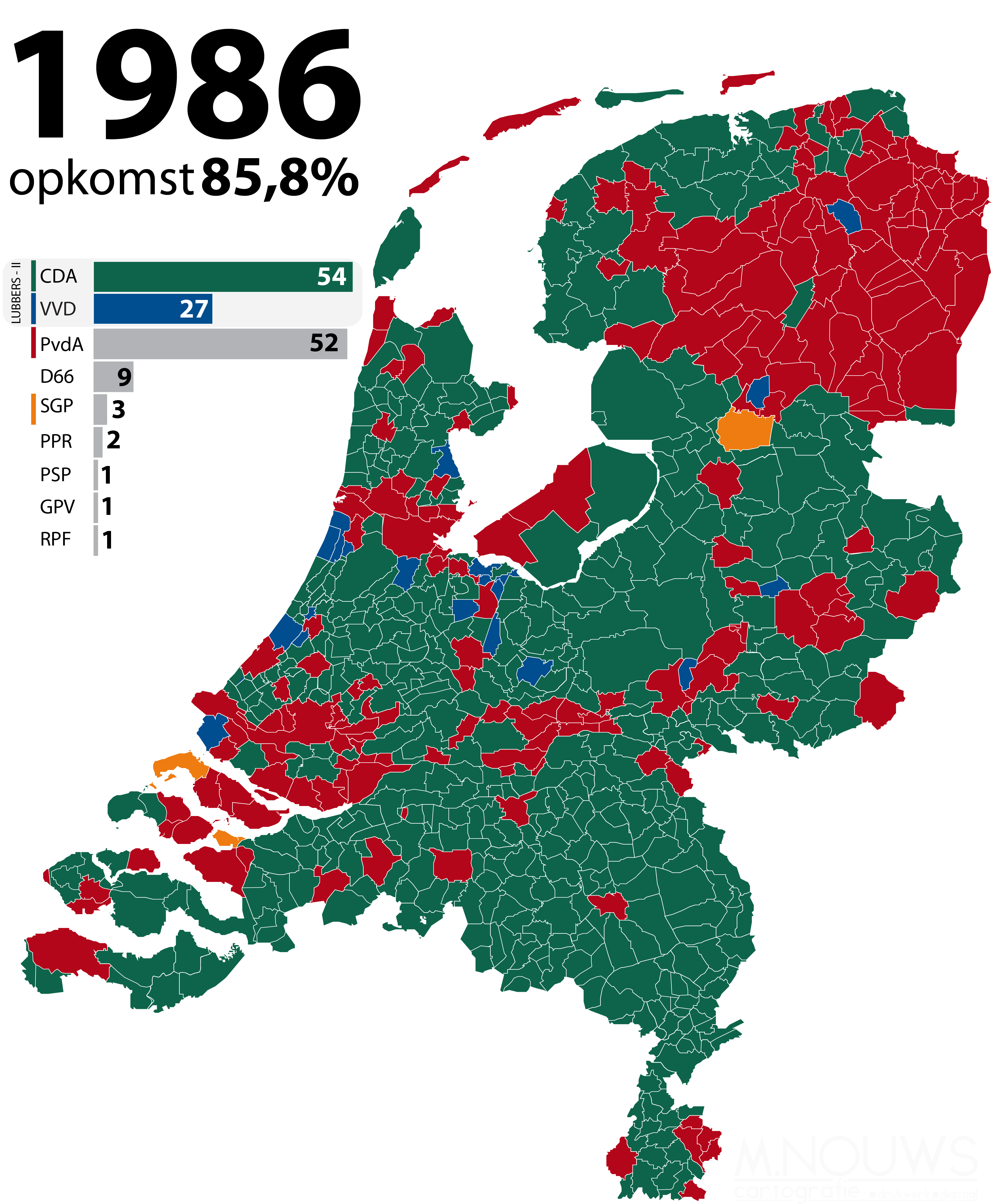 Grootste politieke partij per gemeente, zetelverdeling en kabinetscoalitie bij Tweede Kamerverkiezingen 1986